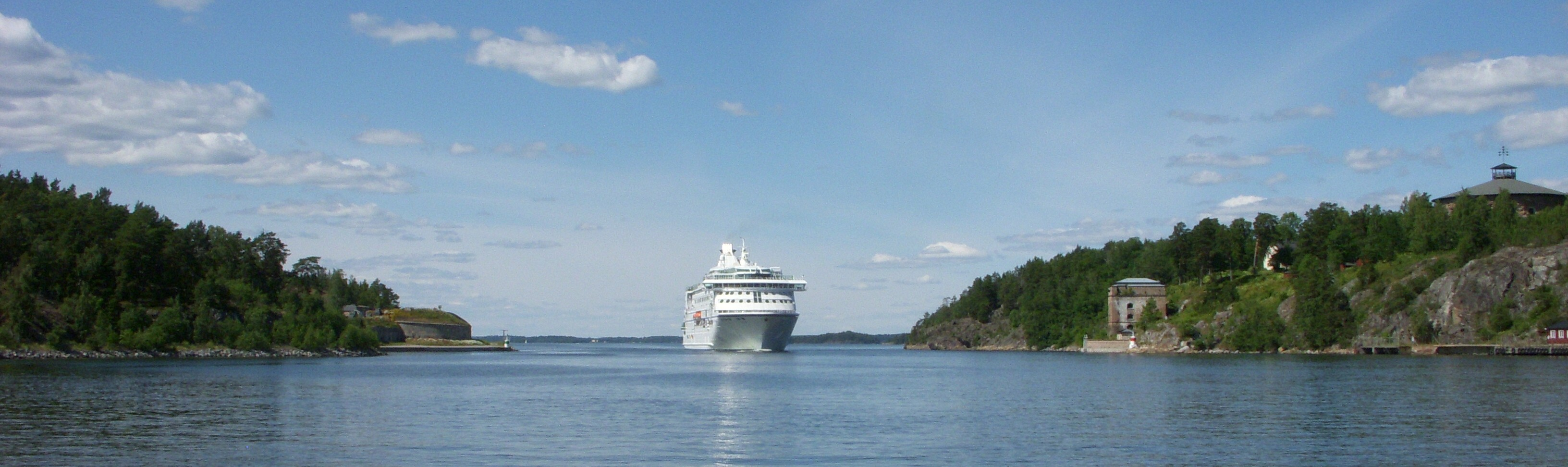 Oxdjupet med Birka Paradise, vy från Oxdjupsleden